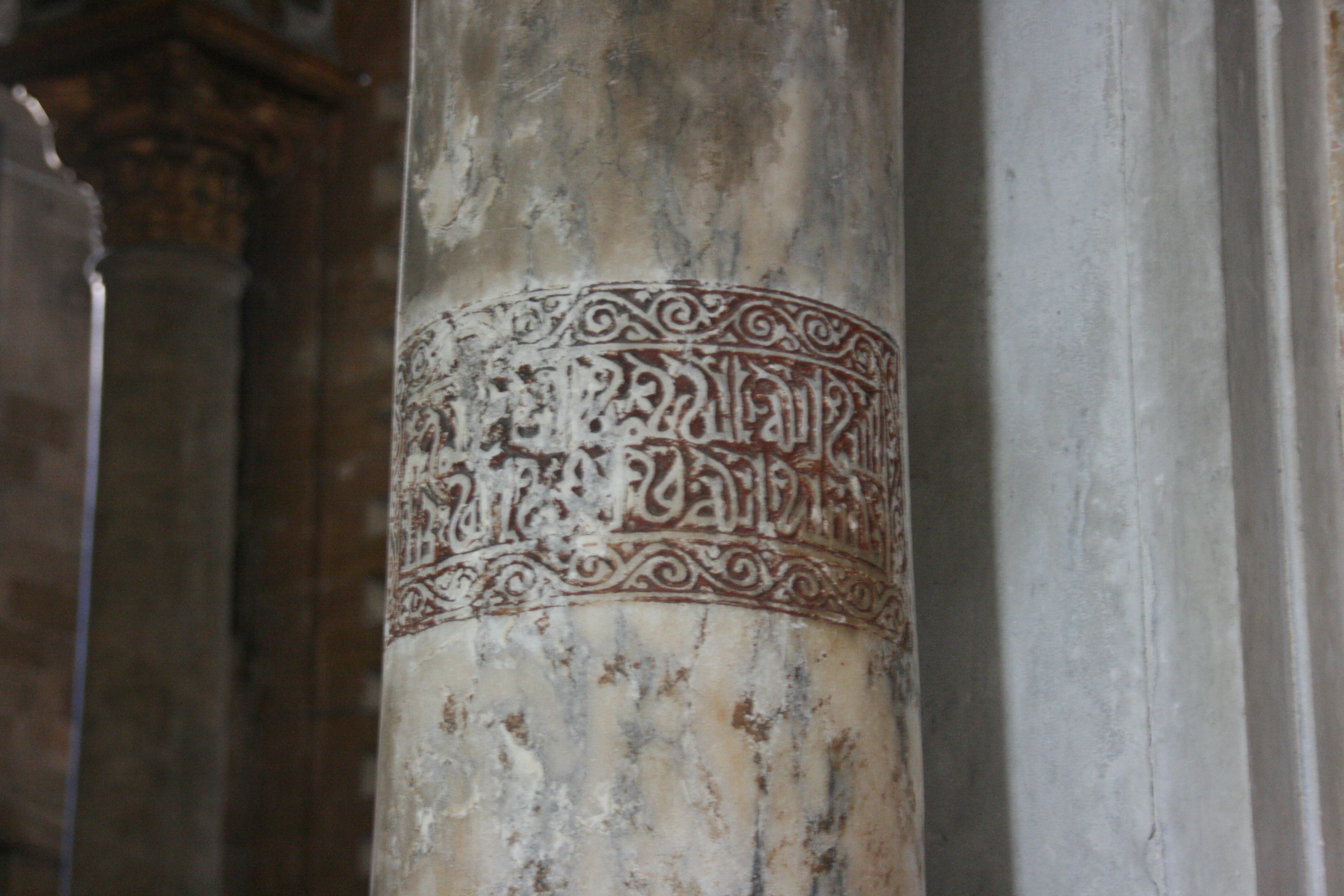 Arabische Schrift in der Martorana